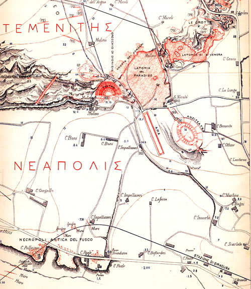 Topografia archeologica di Neapolis: Teatri Greco e Anfiteatro Romano